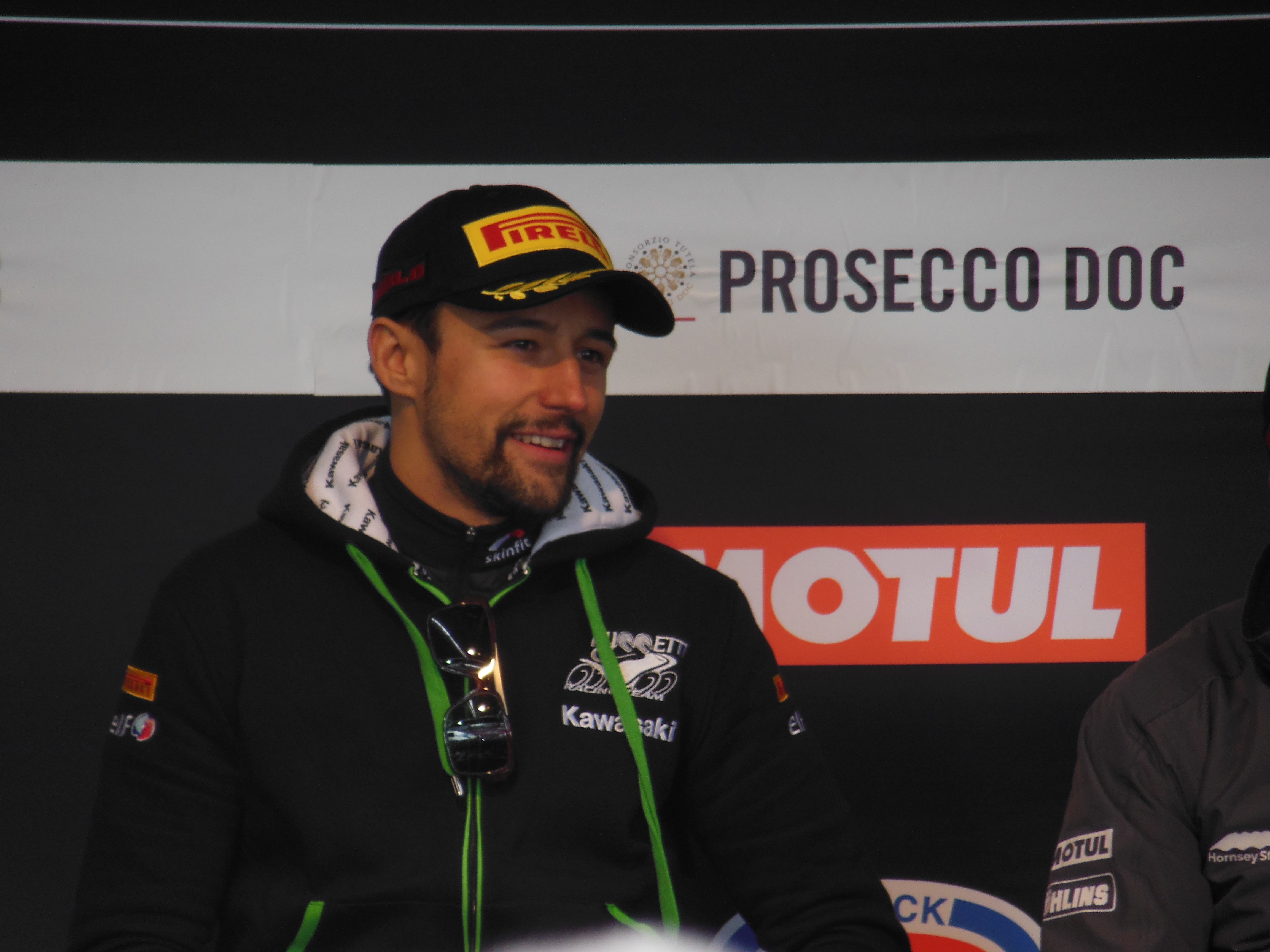 Die Aufnahme habe ich am 16.04.16 in Assen gemacht.